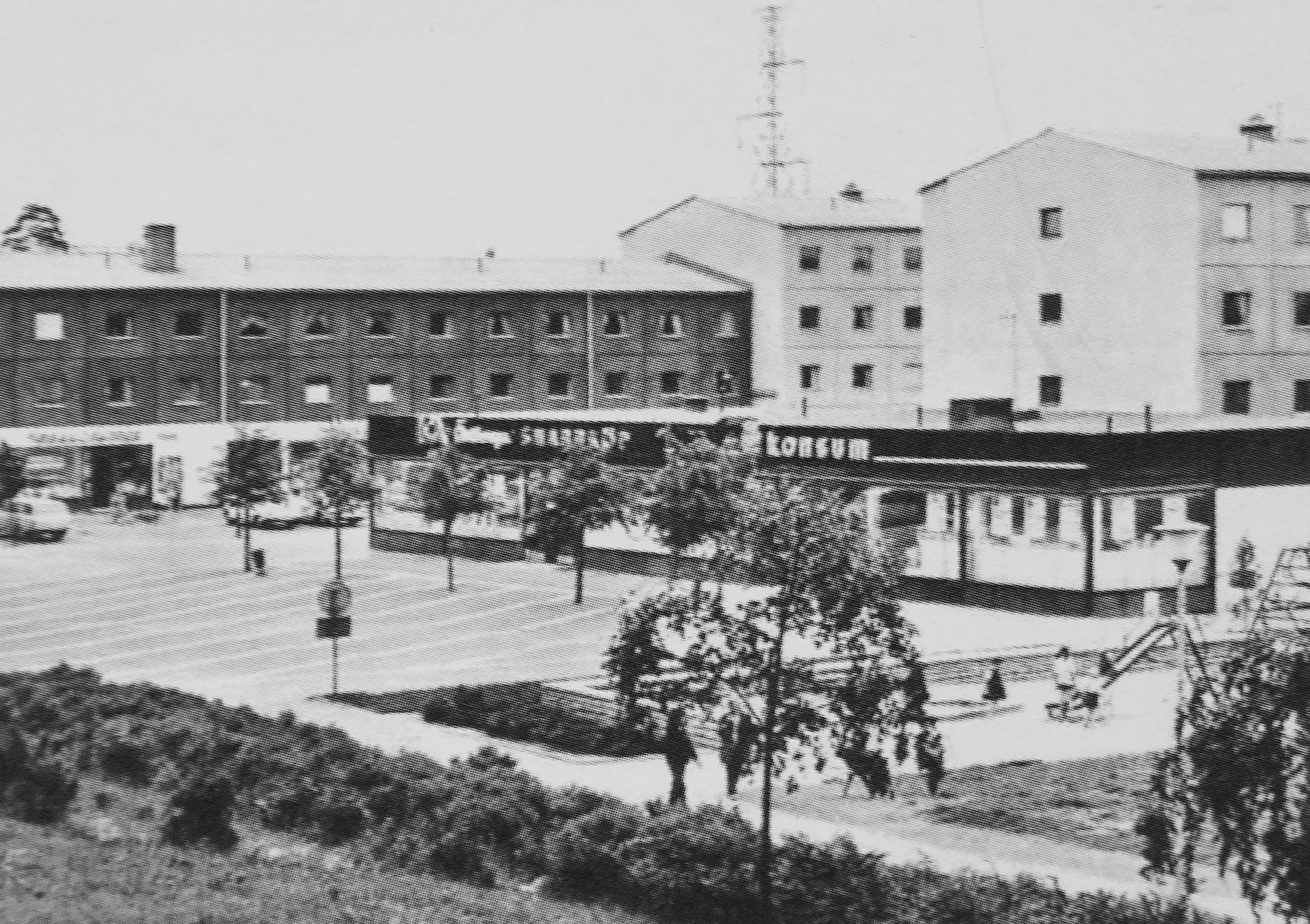 Kvarteret Stamtavlan, centrum